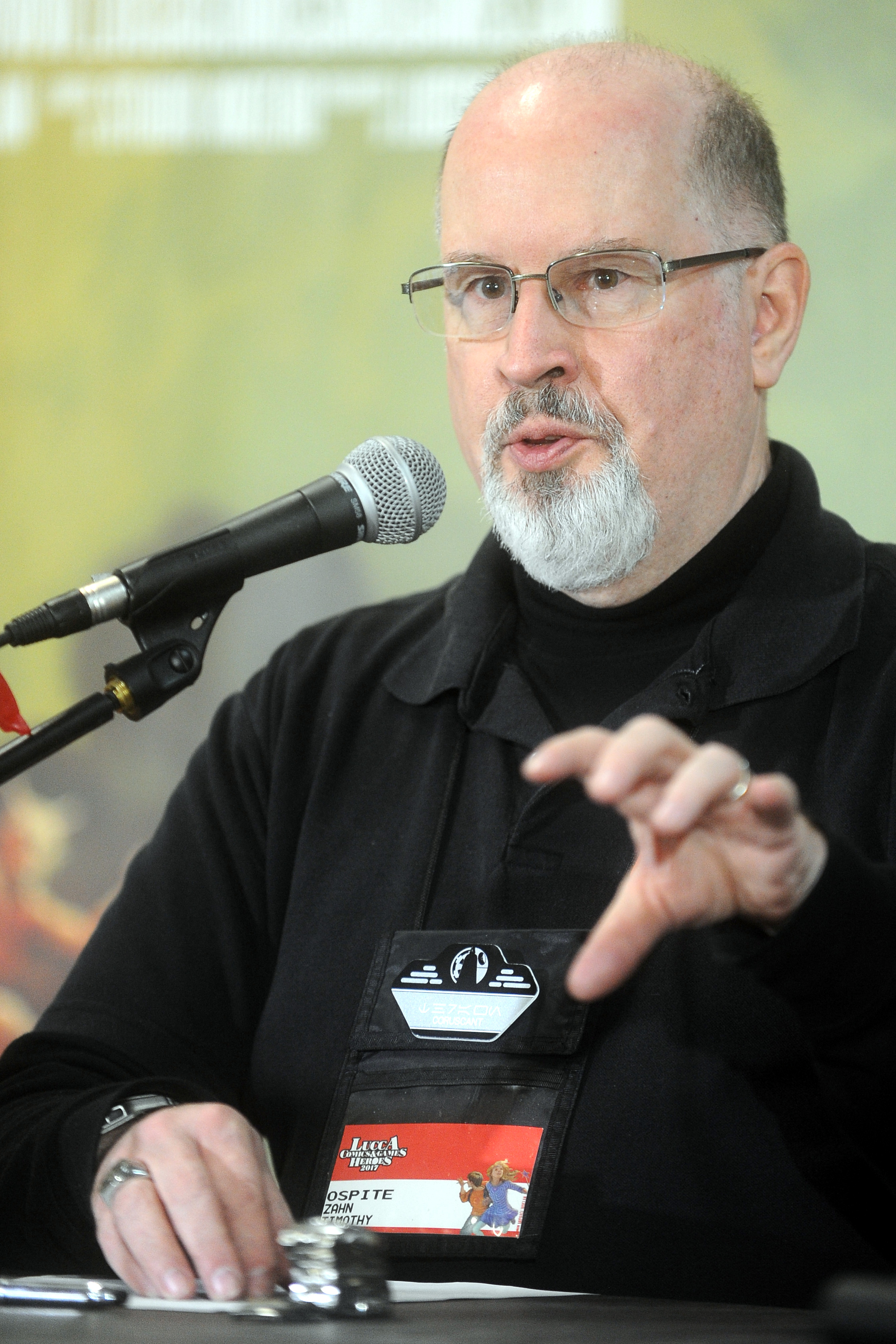 Timothy Zahn. Sala Ingellis.